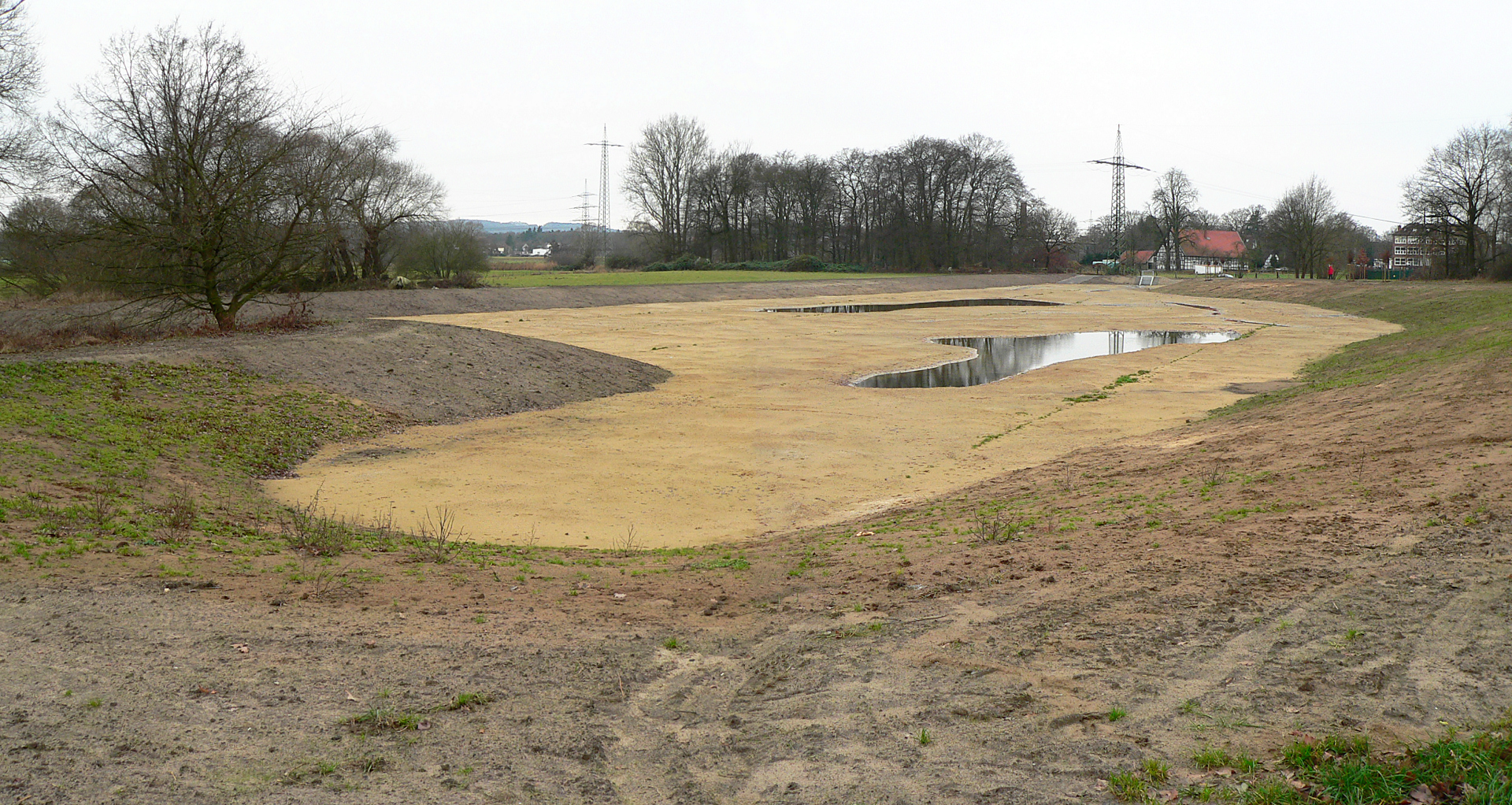 2016 erstelltes Regenrückhaltebecken in OS-Lüstringen, Fundstelle des Kupferschatzes von Osnabrück